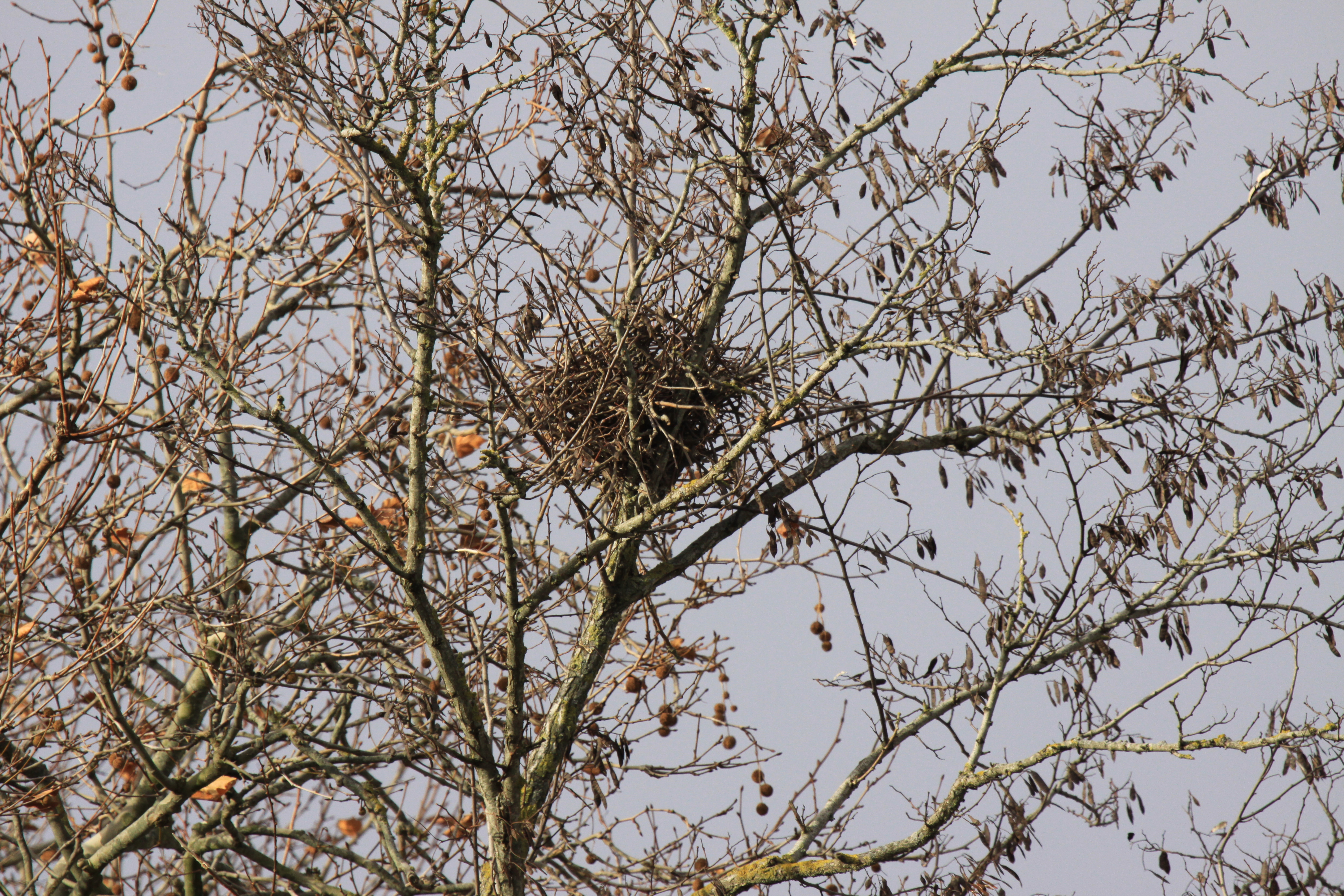 Un nid de corbeau freux dans les branches du sommet d' un haut arbre. Cette photographie a été prise à La Rochelle (France).